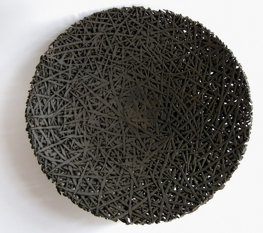 Lidia Boševski: "Gnijezdo", keramika, 2007.